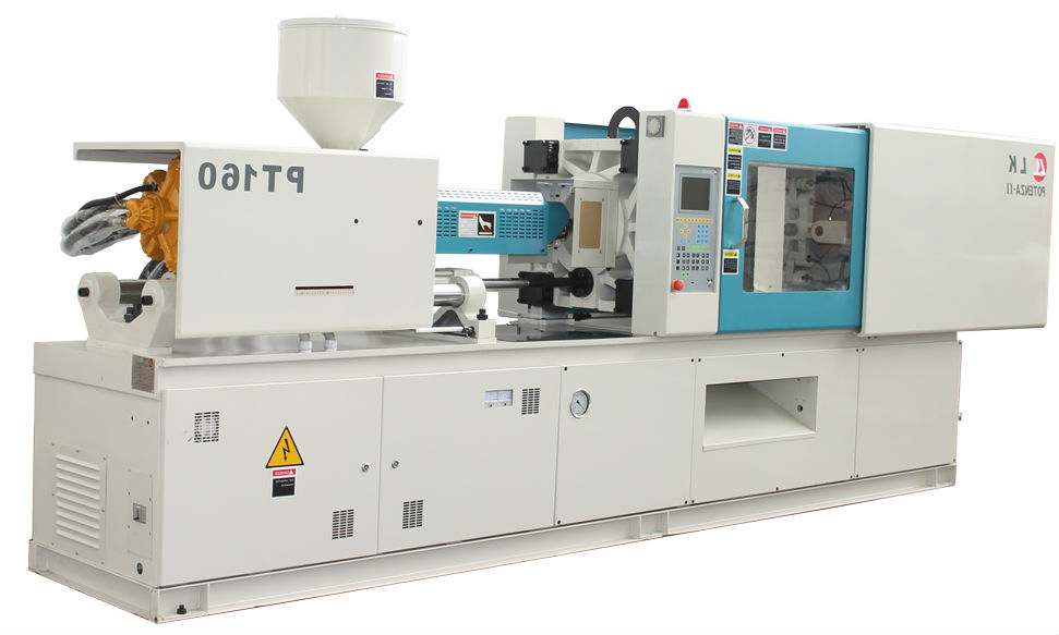 Maquina de inyección de tinta fabricada en china